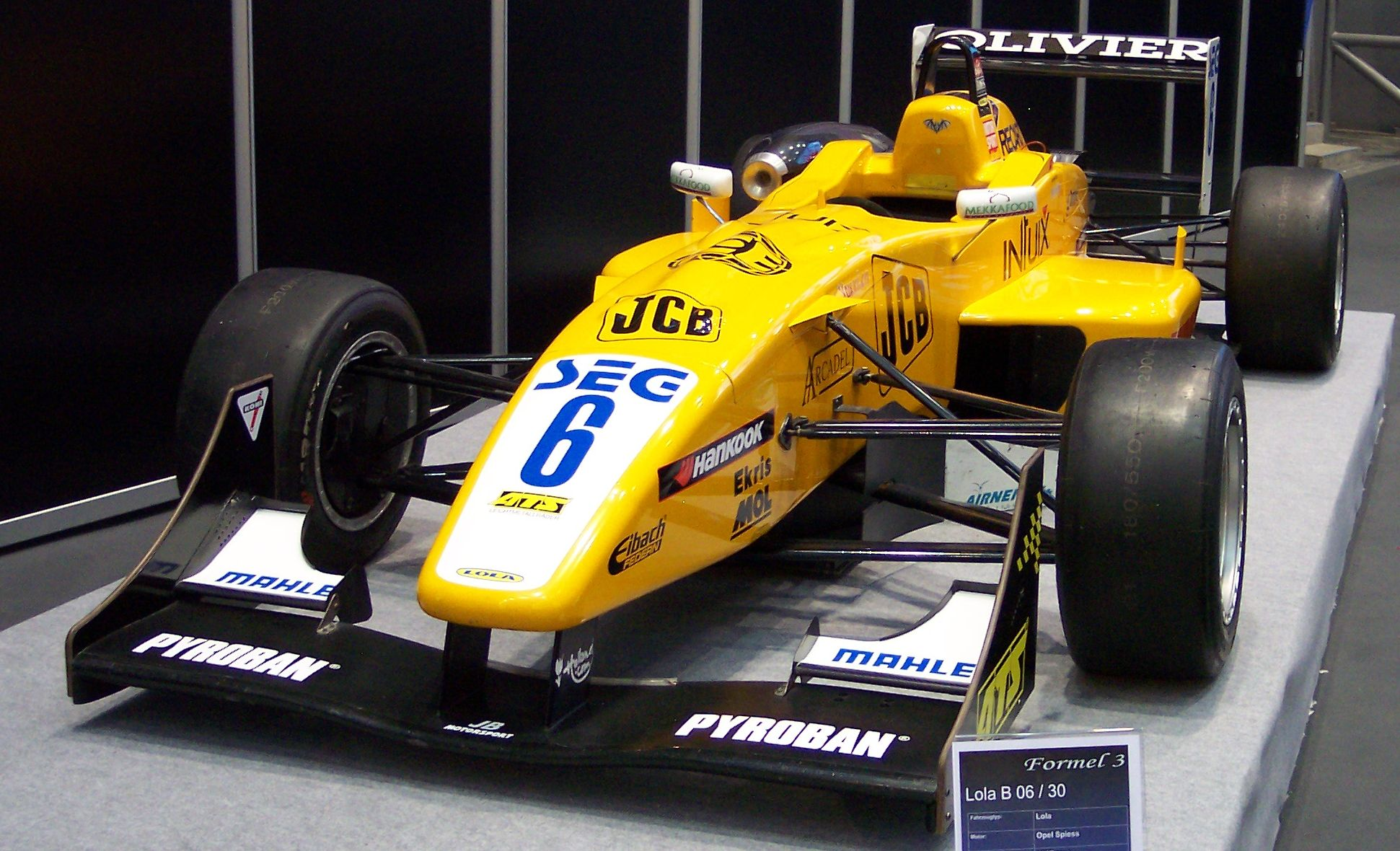 Description: Lola B 06-30 2006 Formula 3 Source: Eigenes Bild